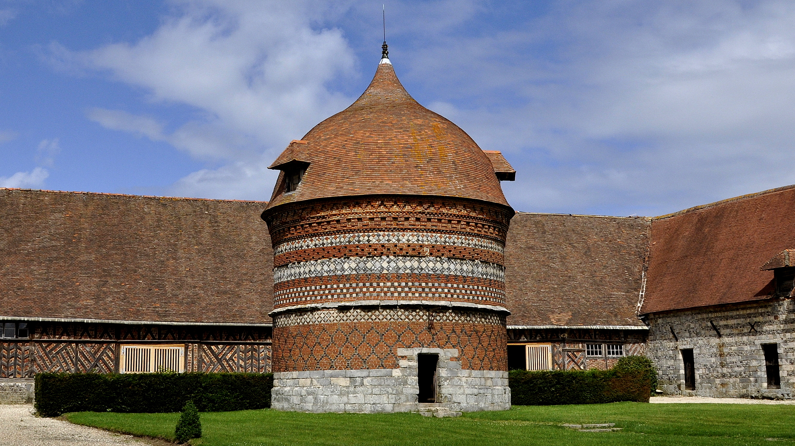 De duiventoren uit 1532 van Manoir d'Ango in Varengeville-sur-Mer, Frankrijk, toen de grootste van Frankrijk